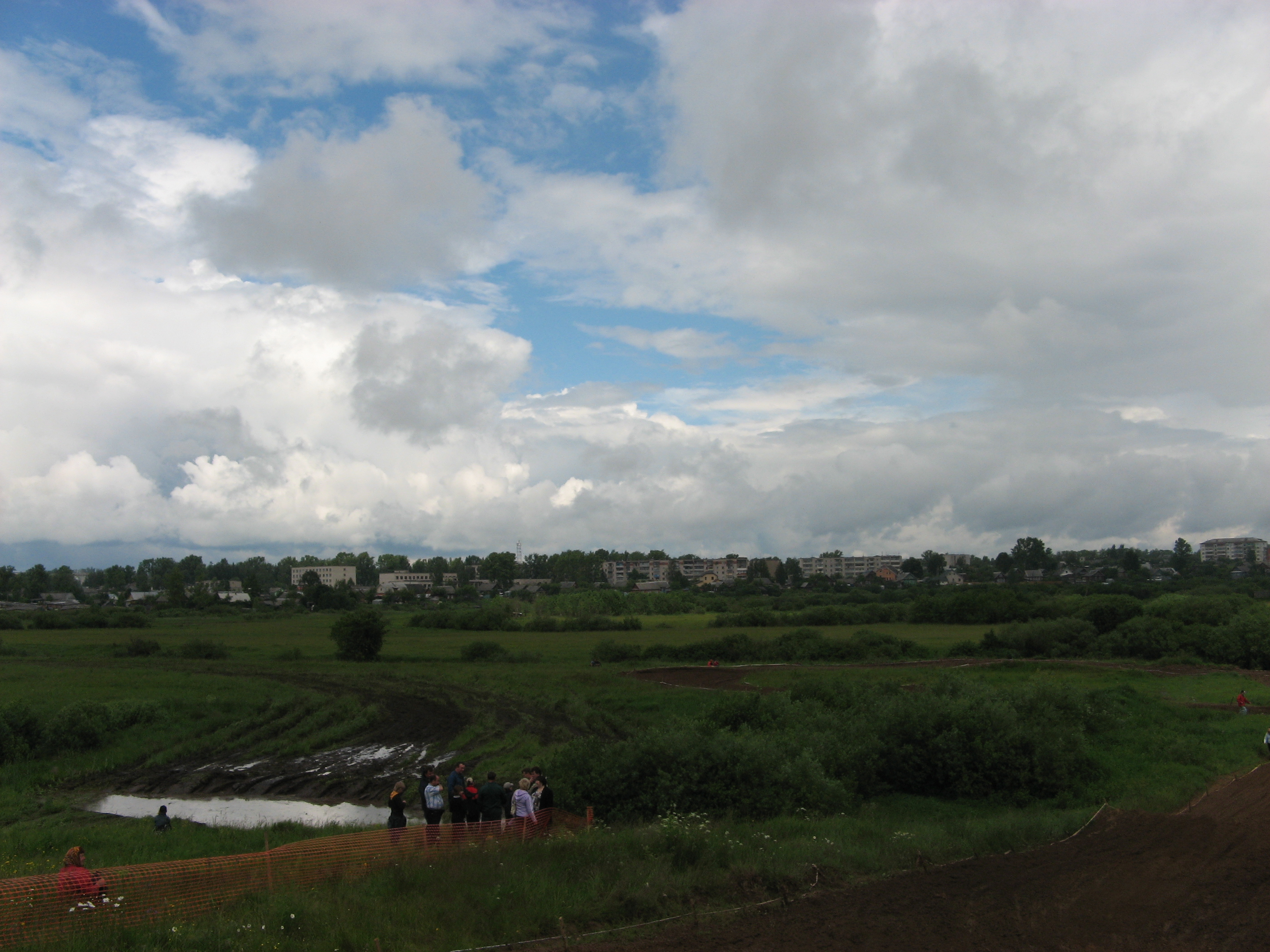 вид на город во время прведения этапа Европейского чемпионата по мотокроссу 29 июня 2008 года.